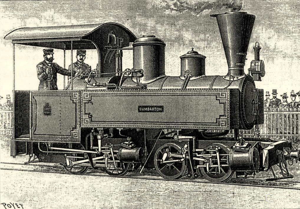 Locomotive compound avec essieux moteurs convergents desservant la voie Decauville à l'Exposition universelle de 1889 (Louis Lucien Baclé)